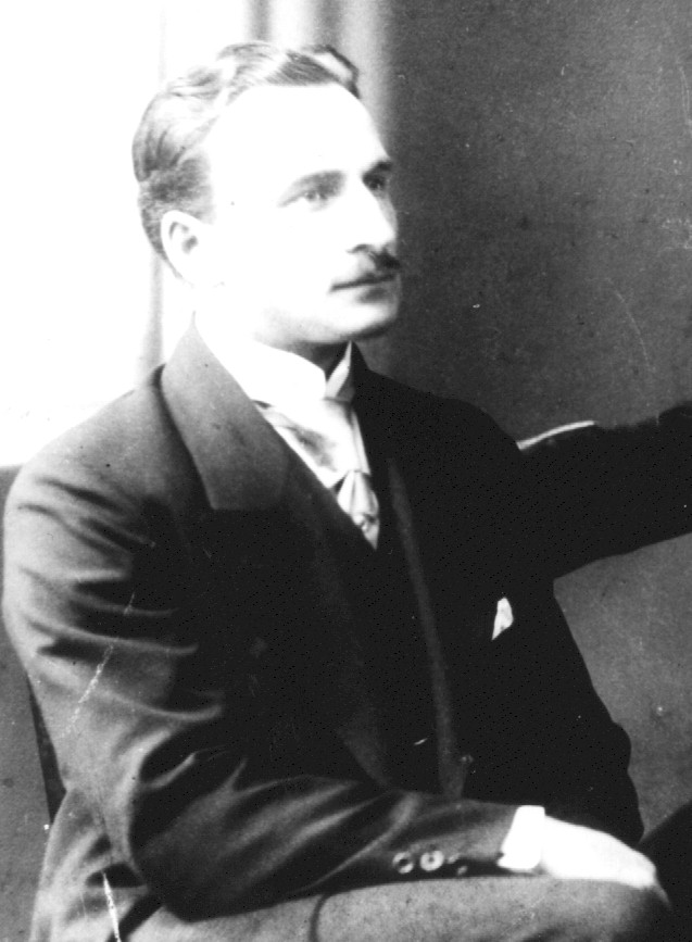 Albert Ziegler, der erste siebenbürgisch-sächsische Flieger